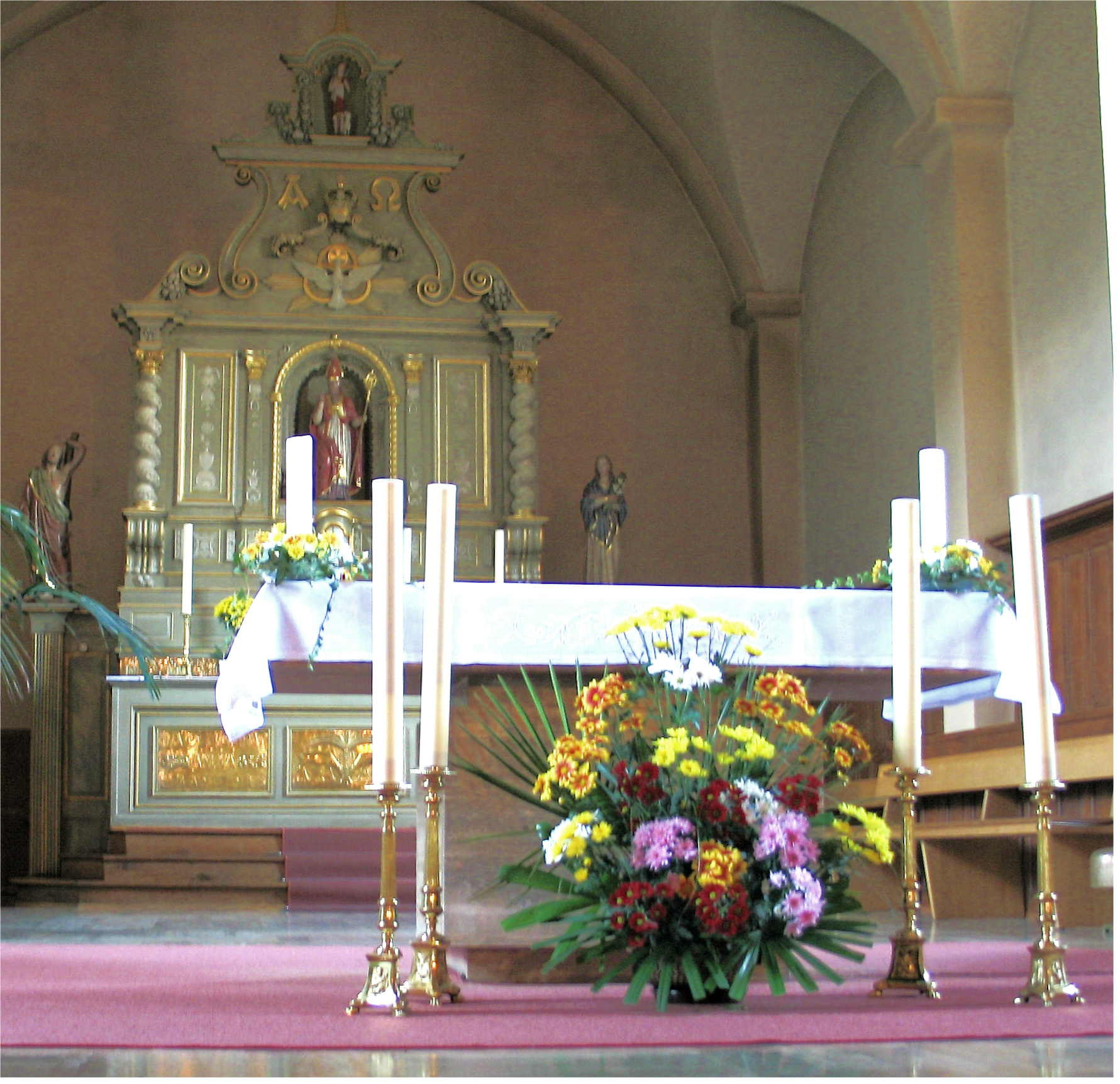 Sujet : Haaptaltor an der Kopleschter Kierch (Abrëll 2006). Kategorie:Gemeng Koplescht Koplescht